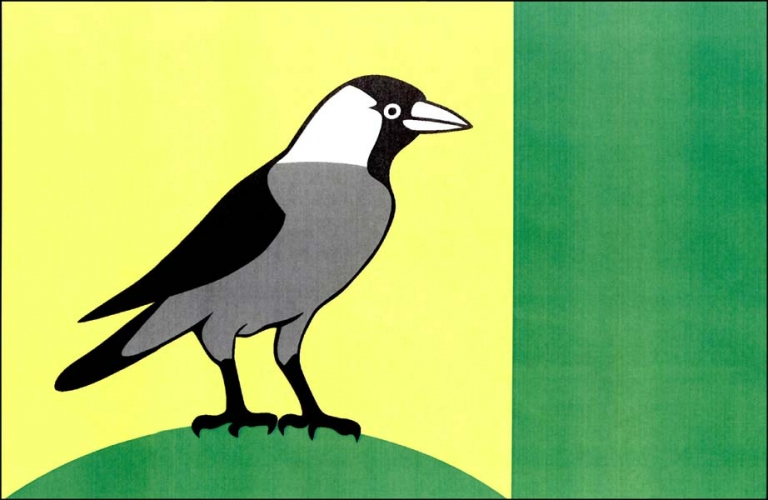 vlajka, Sazomín, okres Žďár nad Sázavou